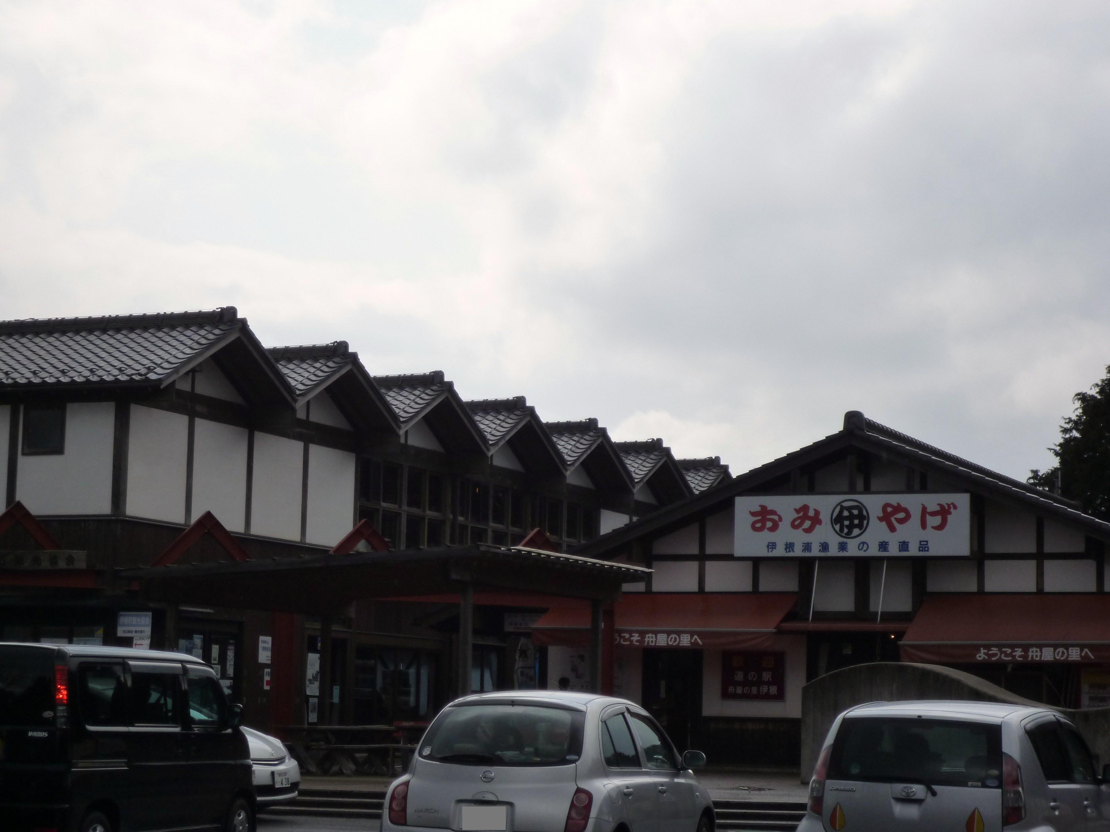 道の駅 舟屋の里 伊根 2010年3月17日撮影